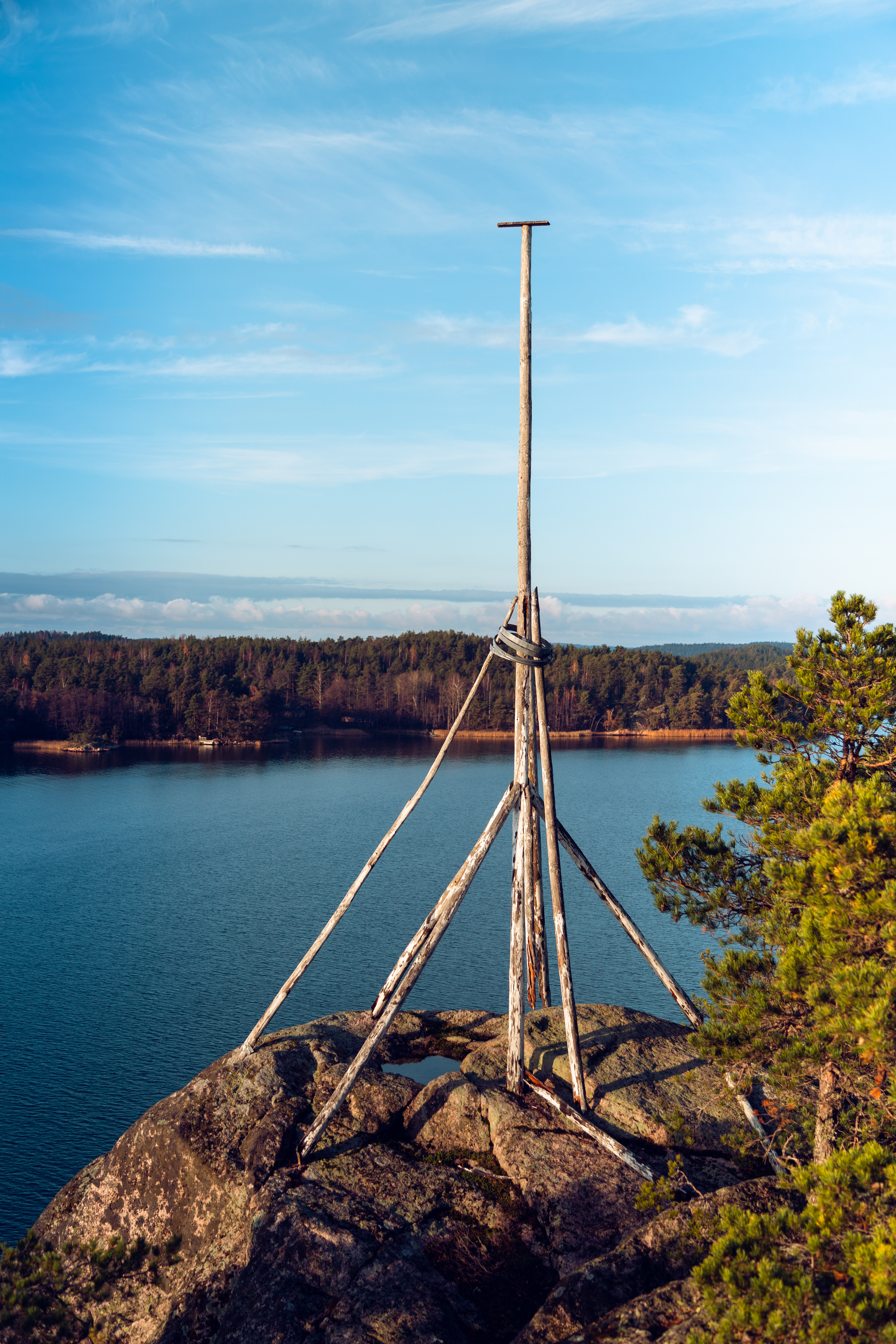 Fornborgen Bornholm i Hangslax, Nagu.